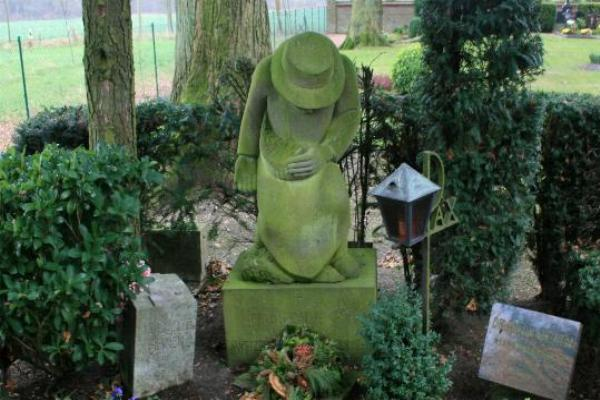 Grabmal von Anton Heinen in Wegberg-Rickelrath